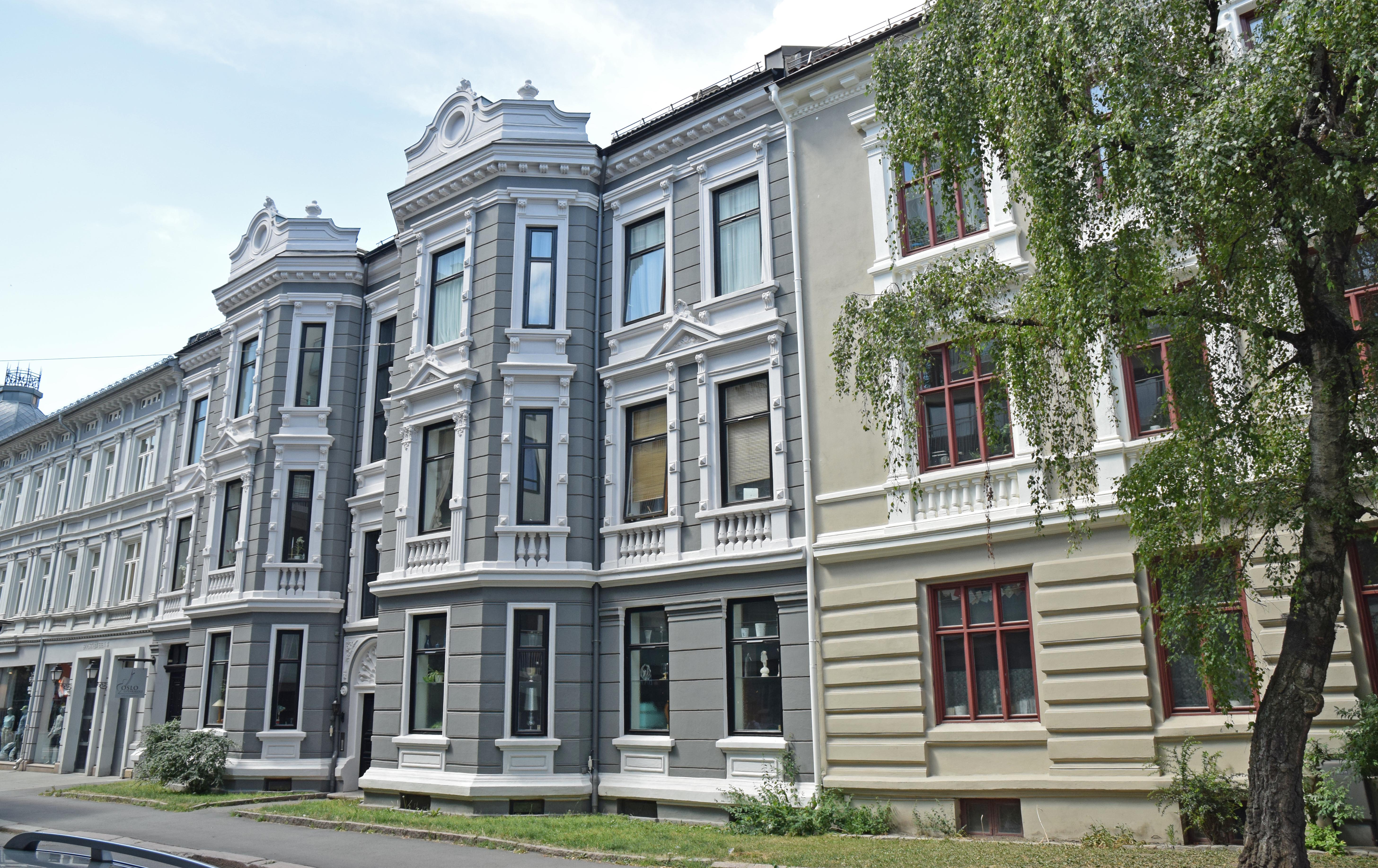 Schultz' gate 2, Majorstuen. Arkitekt: Olaf Boye (1894). Listeført.